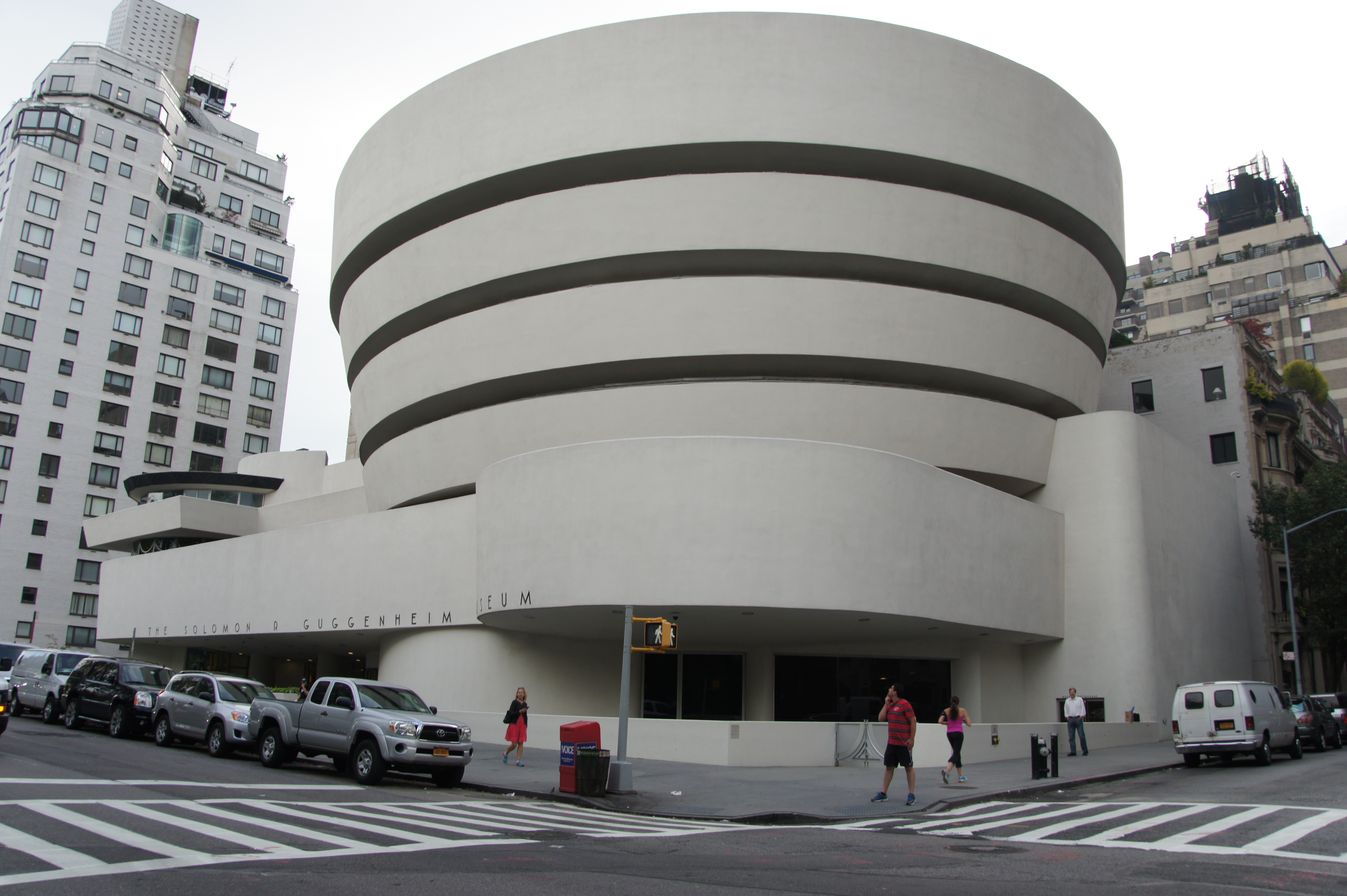 Guggenheim